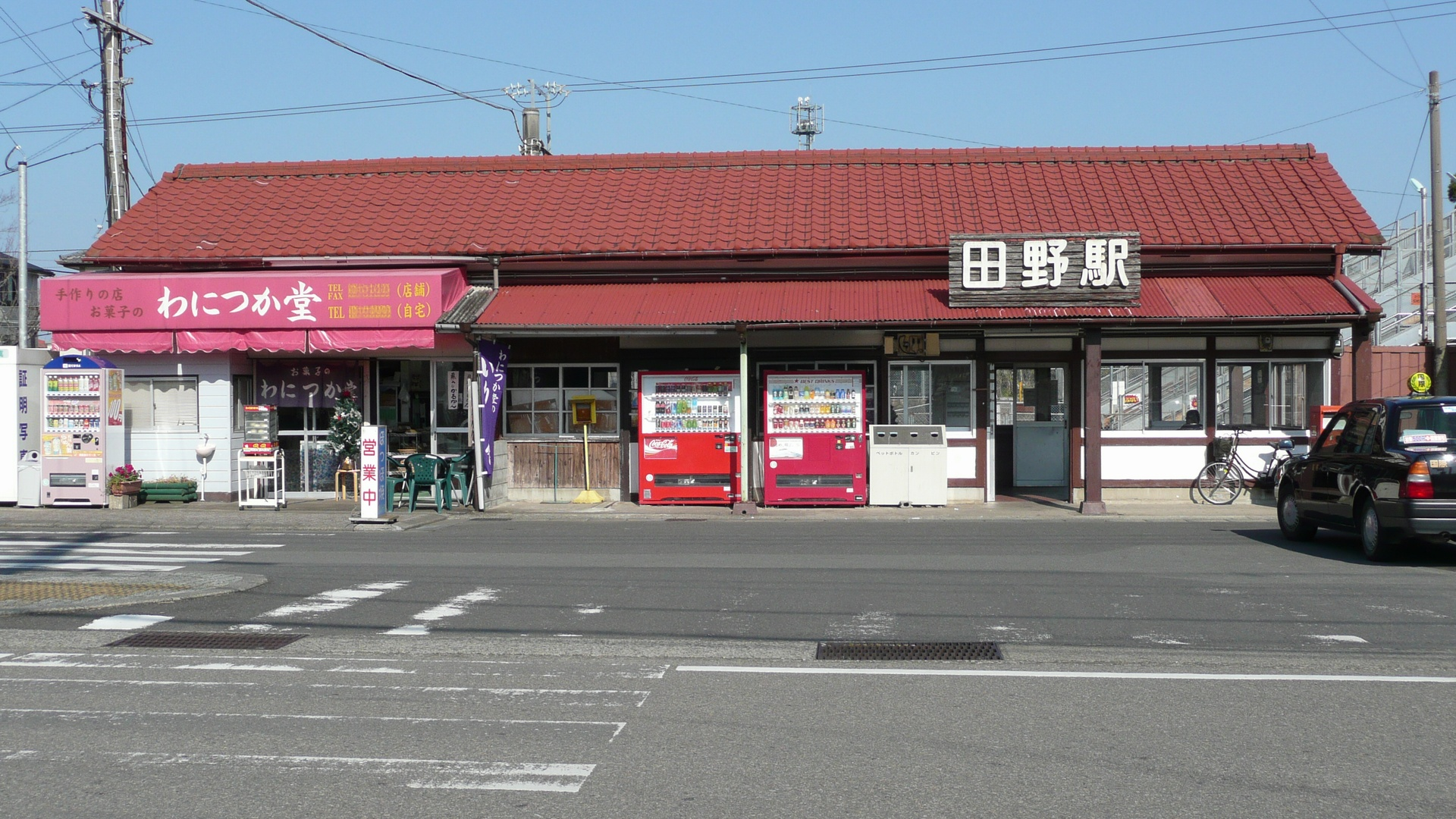 2007/12/2 日豊本線田野駅の駅舎。撮影後リサイズ。電話番号のボカシ処理あり。 撮影&投稿者:Sanjo